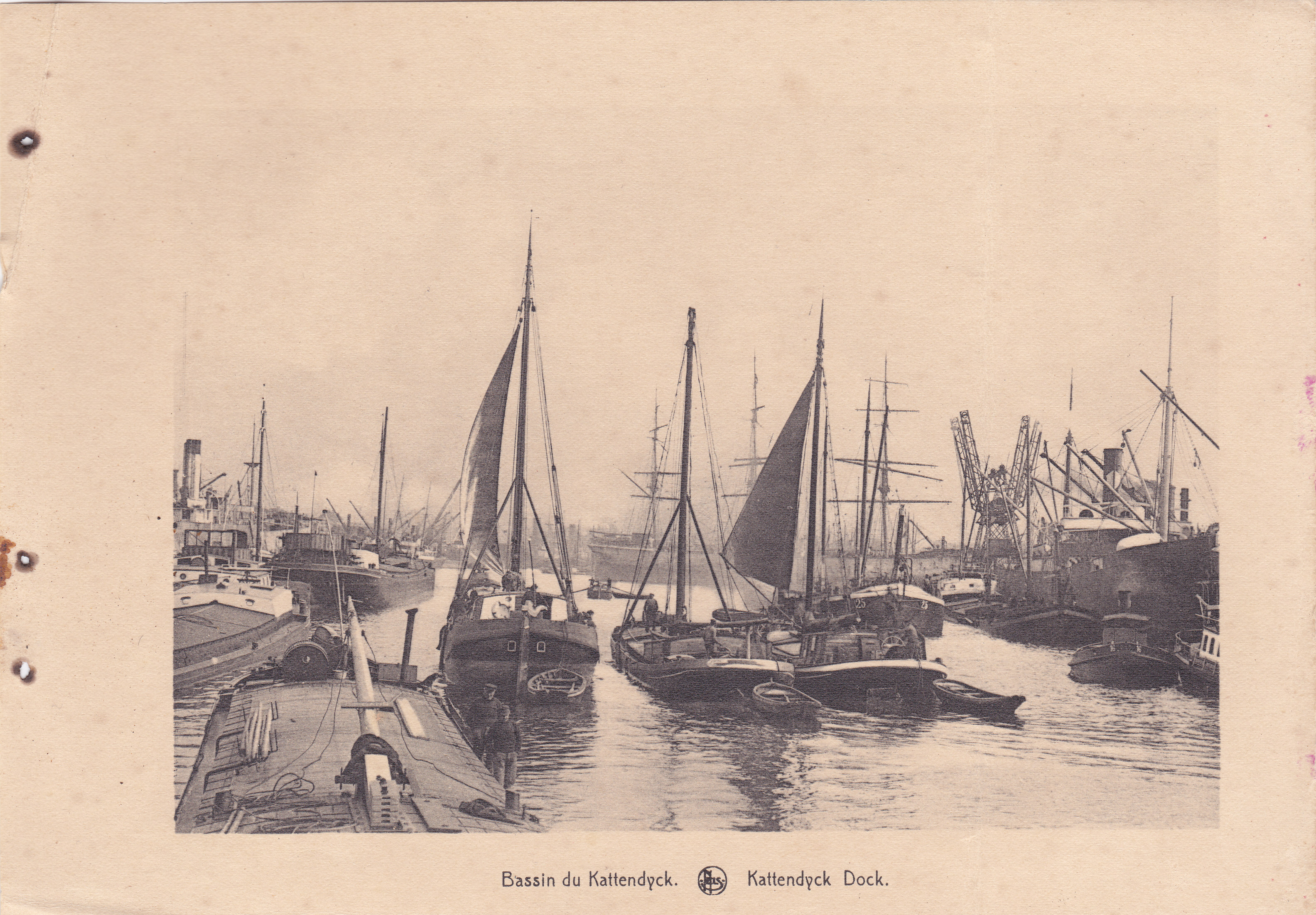 Antuérpia, Bélgica, inicio do Sec. XX, Bassin du Kattendyck, Arquivo de Villa Maria, Angra do Heroísmo, Açores.